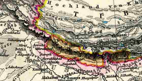 Ausschnitt aus Stielers Handatlas 1891, S. 55, Tafel Asien. Beispiel für einen im deutschsprachigen Raum verbreiteten Irrtum, der höchste Berg der Welt hieße Gauri Sankar.